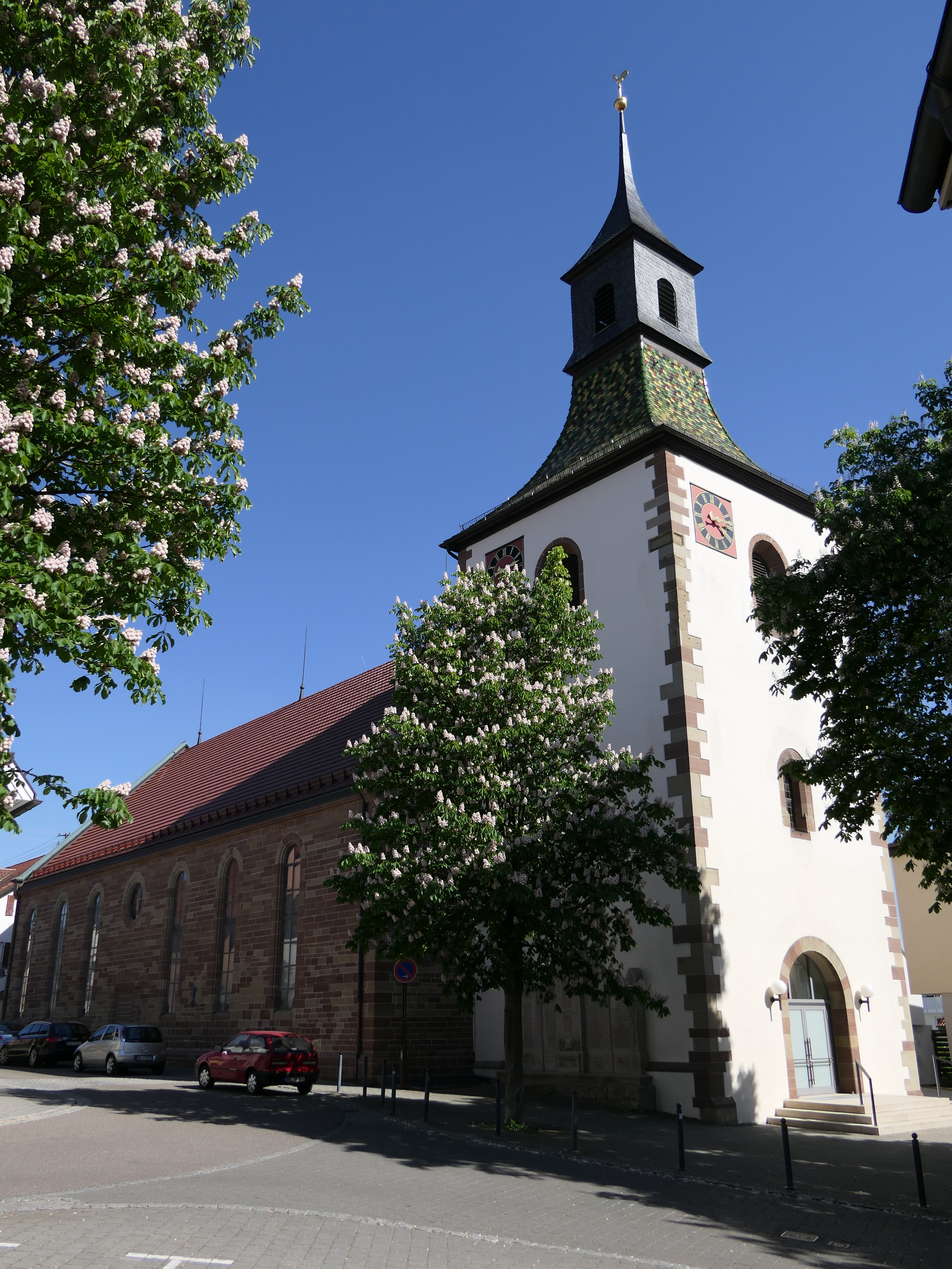 Evangelische Kirche in Korb, Rems-Murr-Kreis.